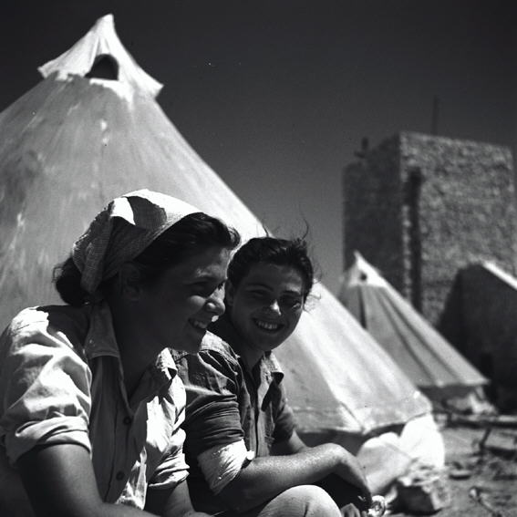 ביריה - שתי חברות הקבוצה בשיחה ליד אהלן.